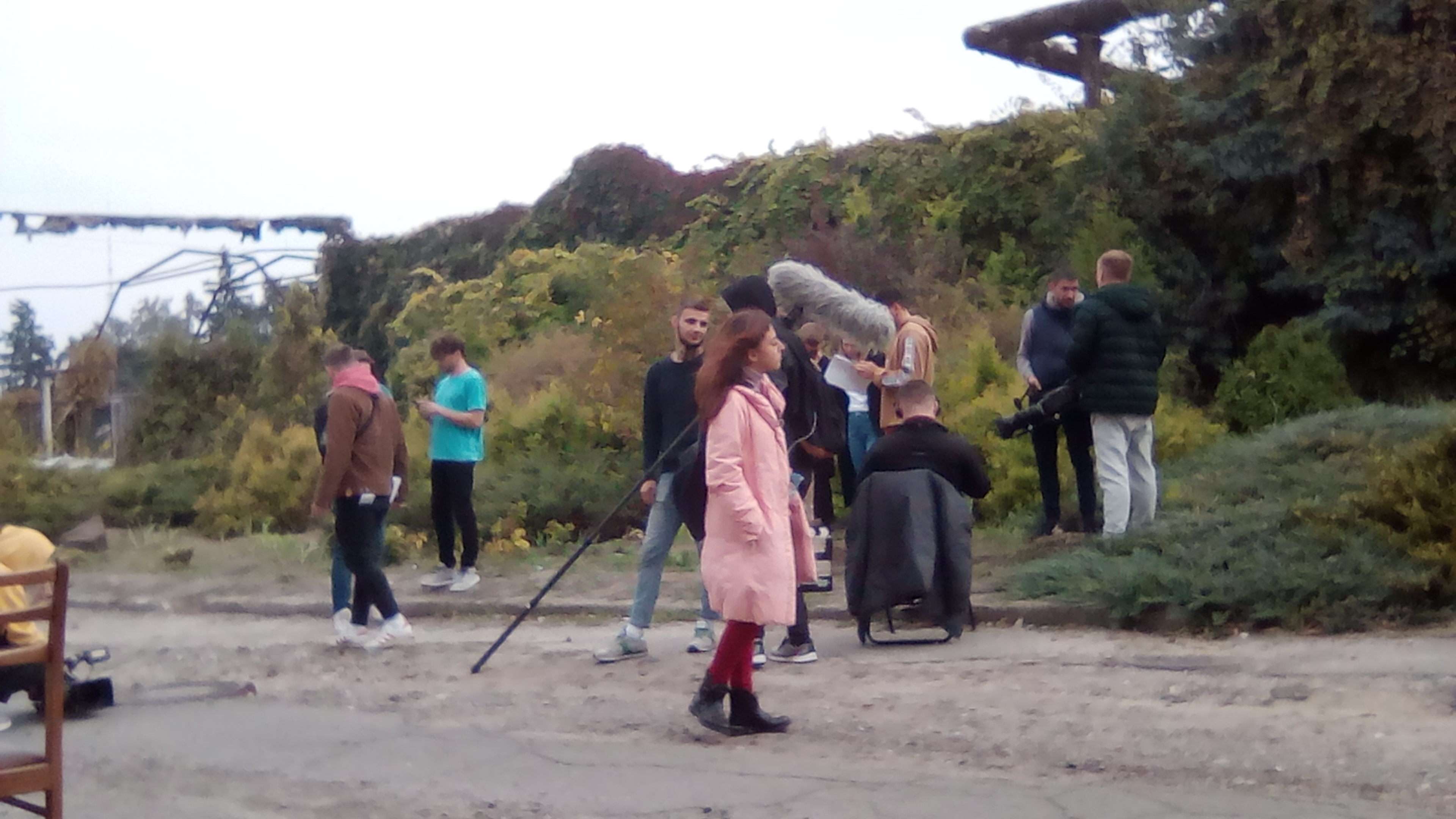 Съёмки